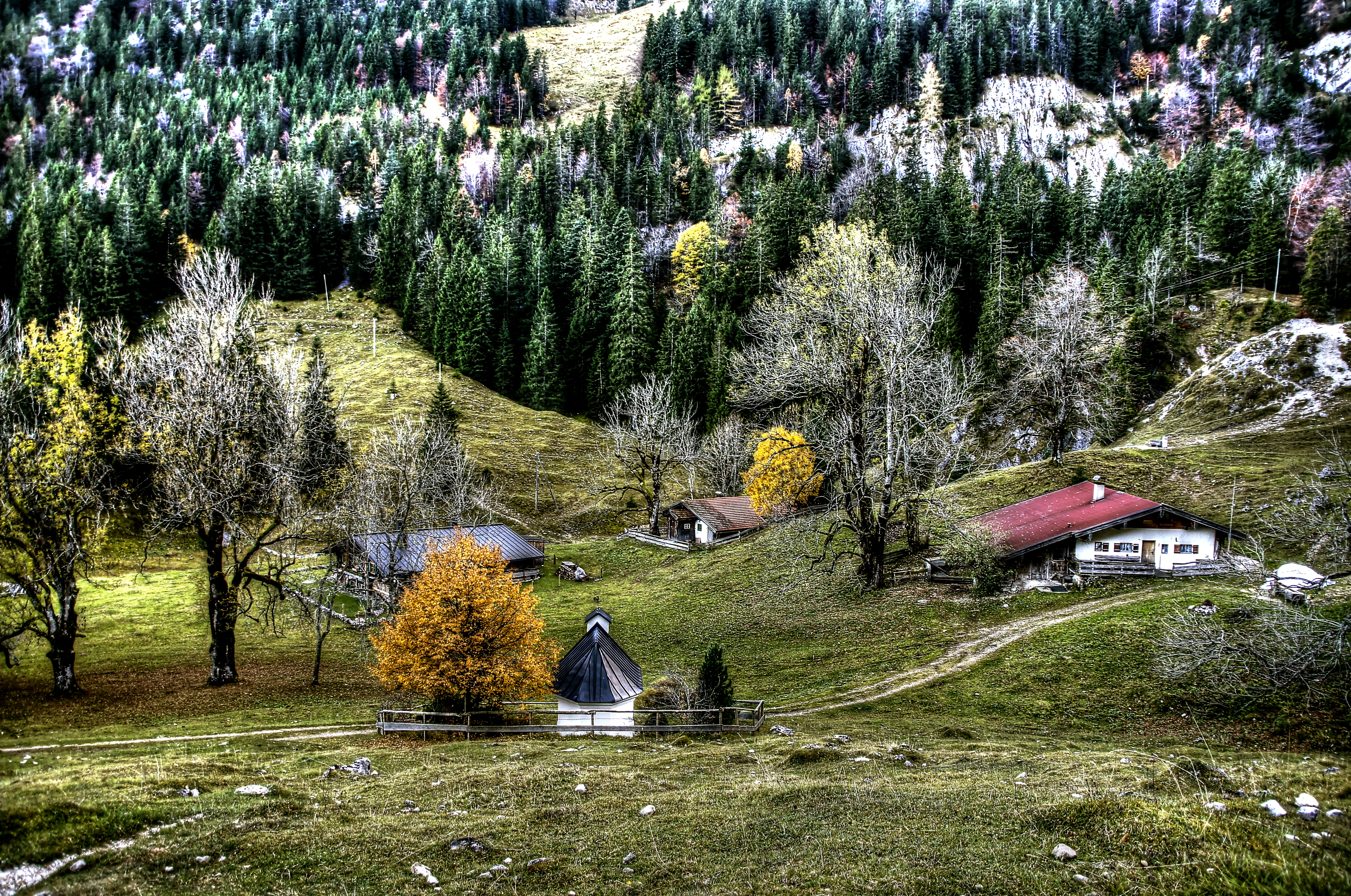 Wendelstein - Mitteralm